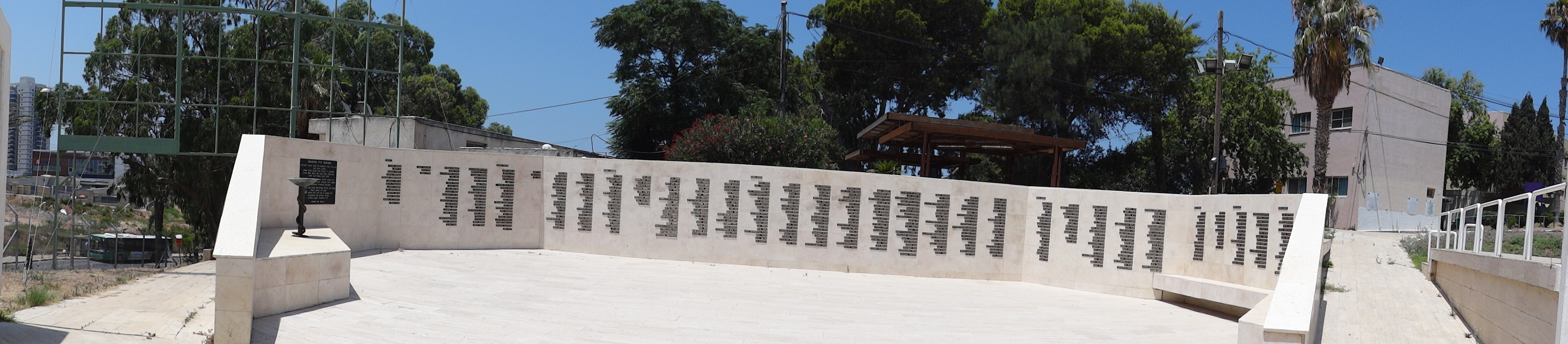 תמונות פנורמיות של אנדרטת חיל הרפואה נמצאת בבסיס מרפ"א צפון בבה"ד 10 בחיפה. האנדרטה היא חלק מאתר ההנצחה המרכזי לחללי חיל הרפואה. סמוך לה חקוקים על קיר הנצחה שמותיהם שלאנשי חיל הרפואה שנפלו מאז מלחמת העצמאות, רופאים, חובשים, פרמדיקים ובעלי מקצועות ותפקידים נוספים בחיל הרפואה.